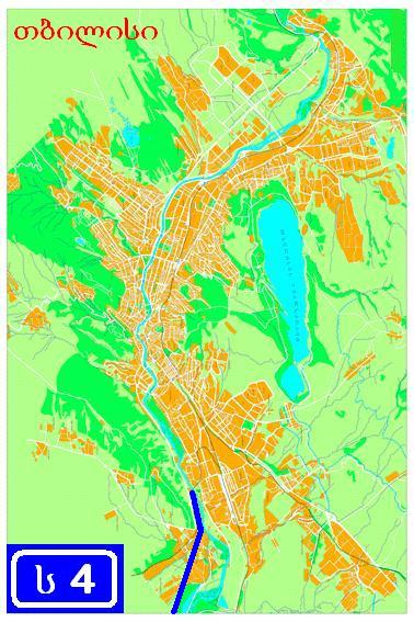 საქართველოს საავტომობილო მაგისტრალი ს4